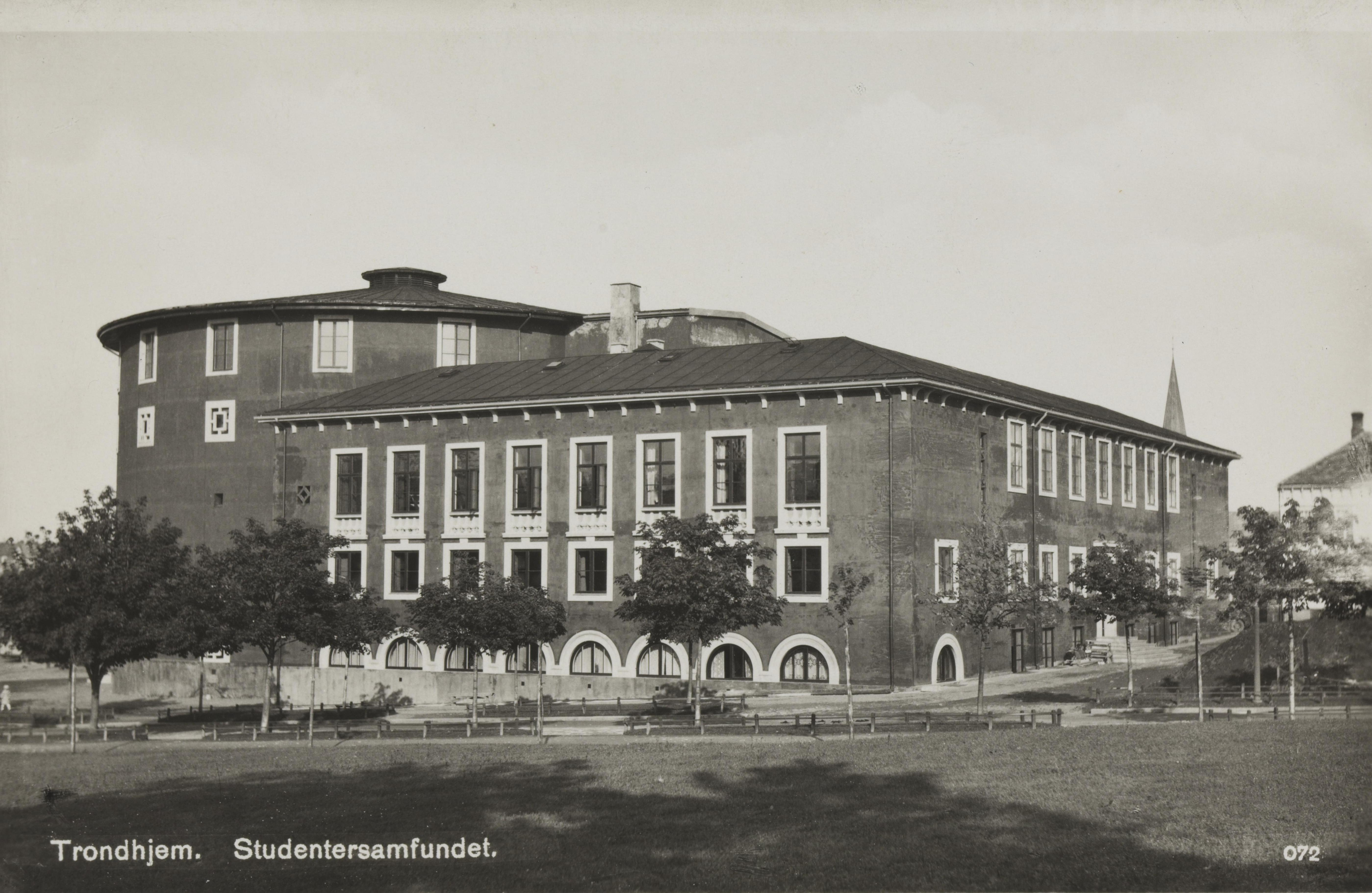 Bildet er hentet fra Nasjonalbibliotekets bildesamling Elgeseter, Trondheim, Sør Trøndelag